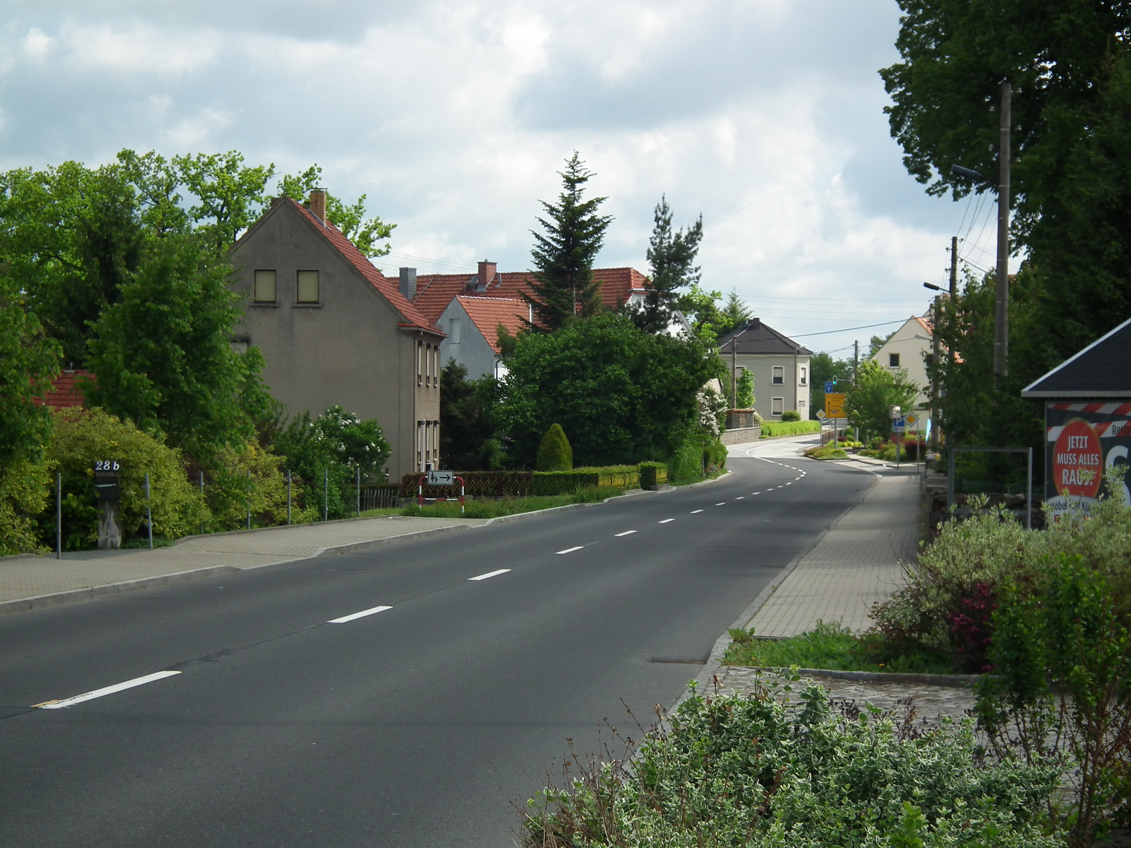 Laußnitz